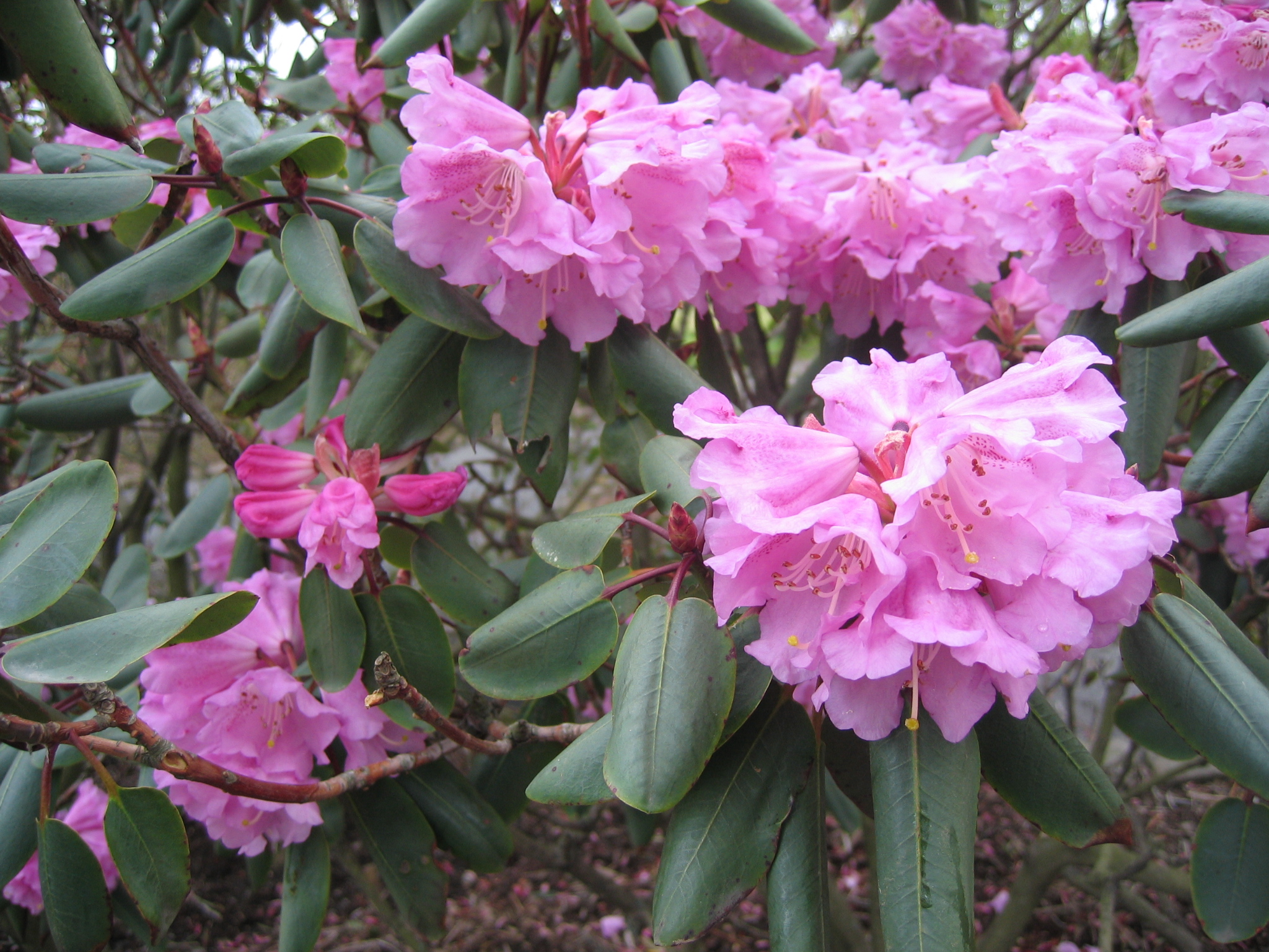 photo taken by Salvör in Grasagarður Reykjavíkur Botanical garden in Reykjavik, Iceland.